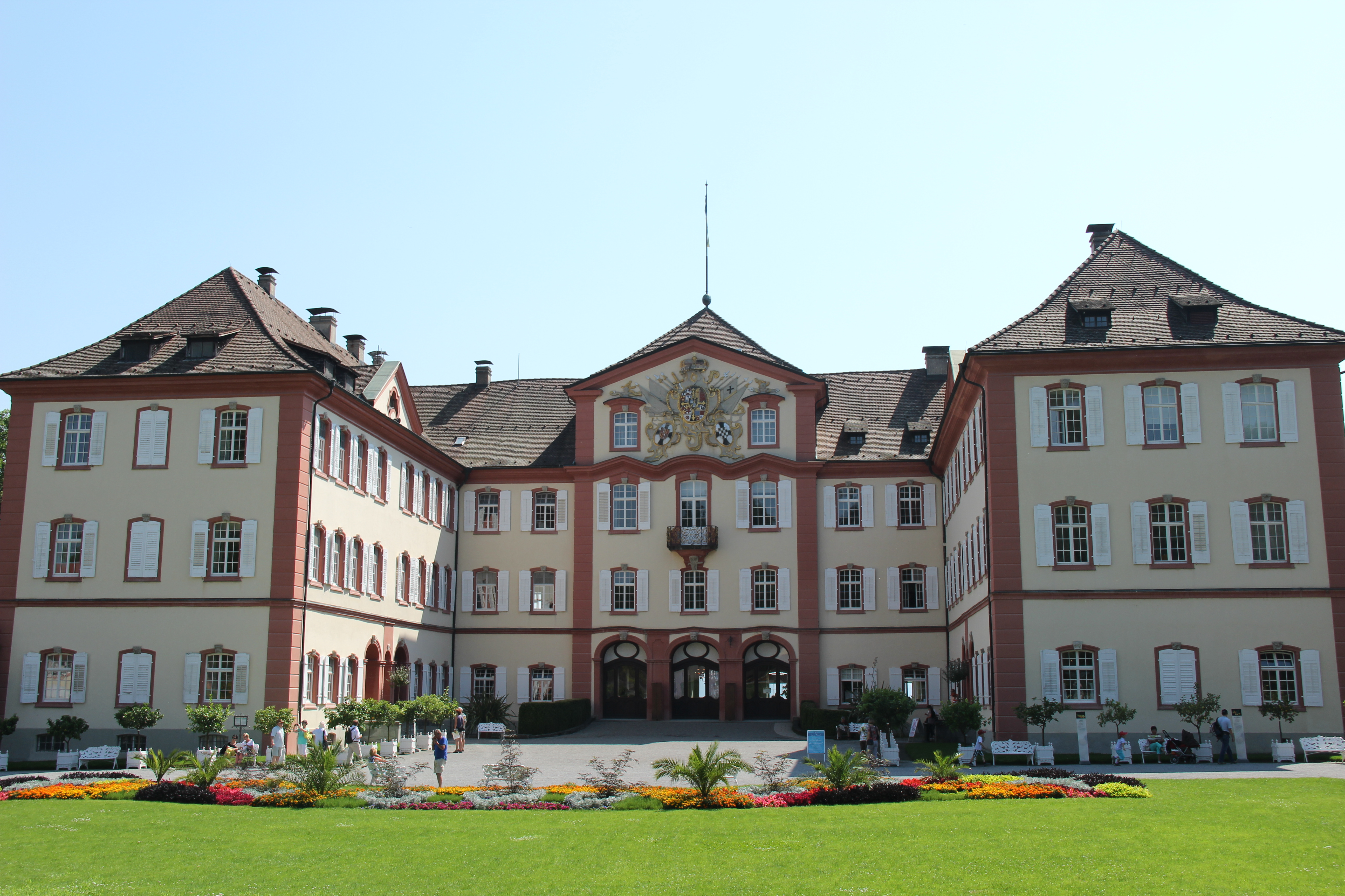 Deutschland, Baden-Württemberg, 78465 Insel Mainau